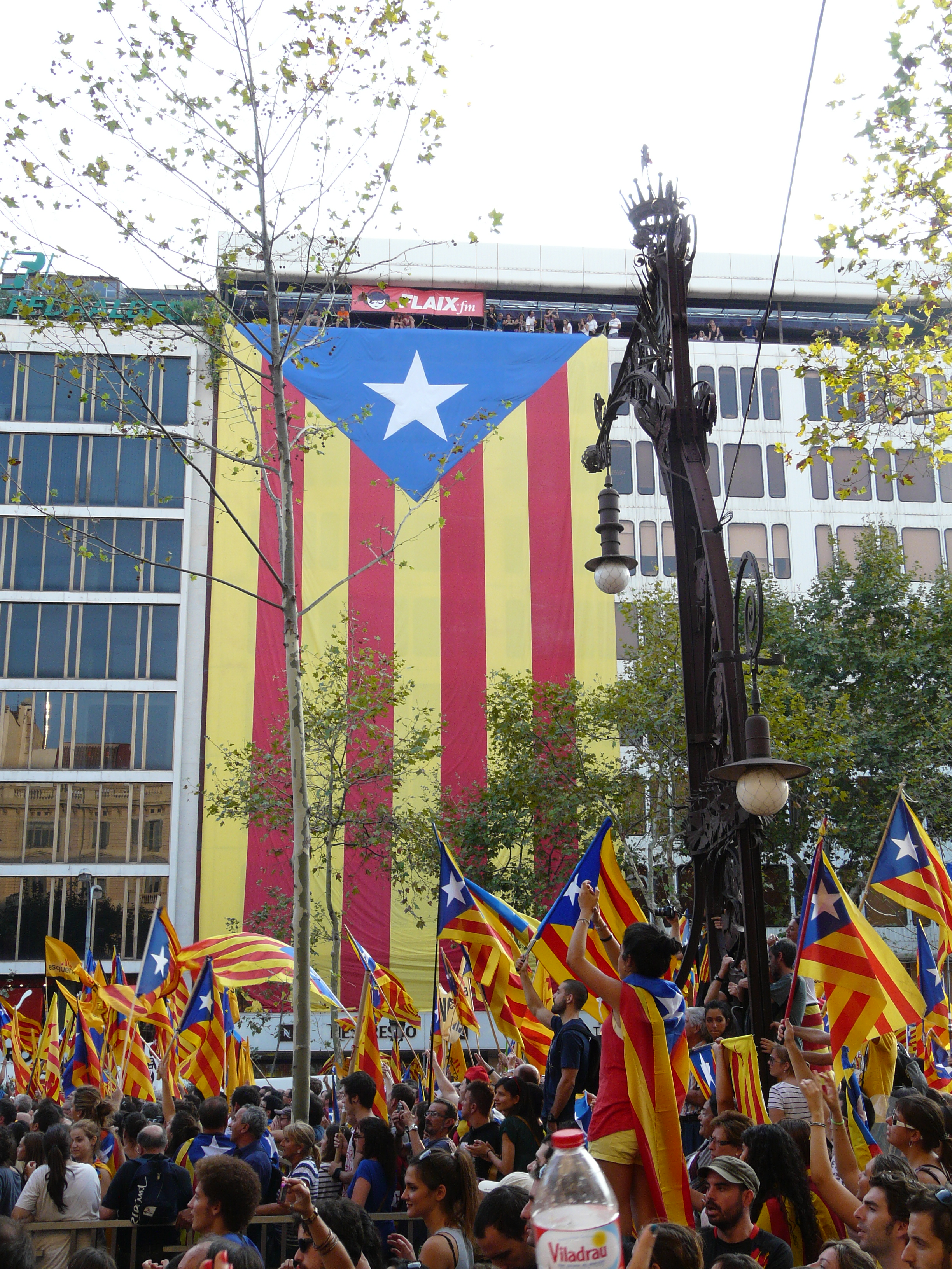 Fanals-Banc (Barcelona) Object location41° 23′ 24.77″ N, 2° 10′ 01.76″ E